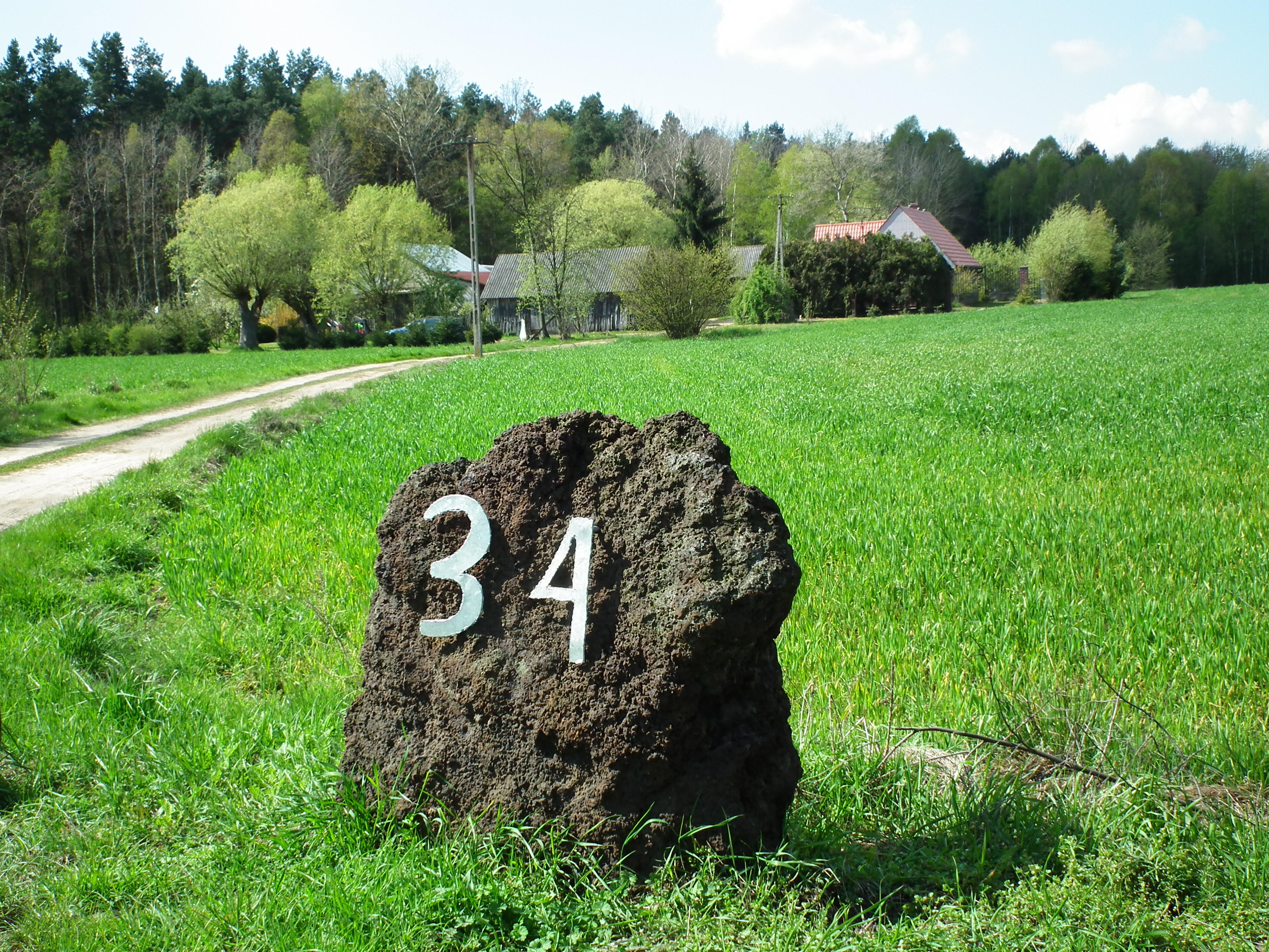 Wieś Czarnybród w Puszczy Pyzdrskiej.